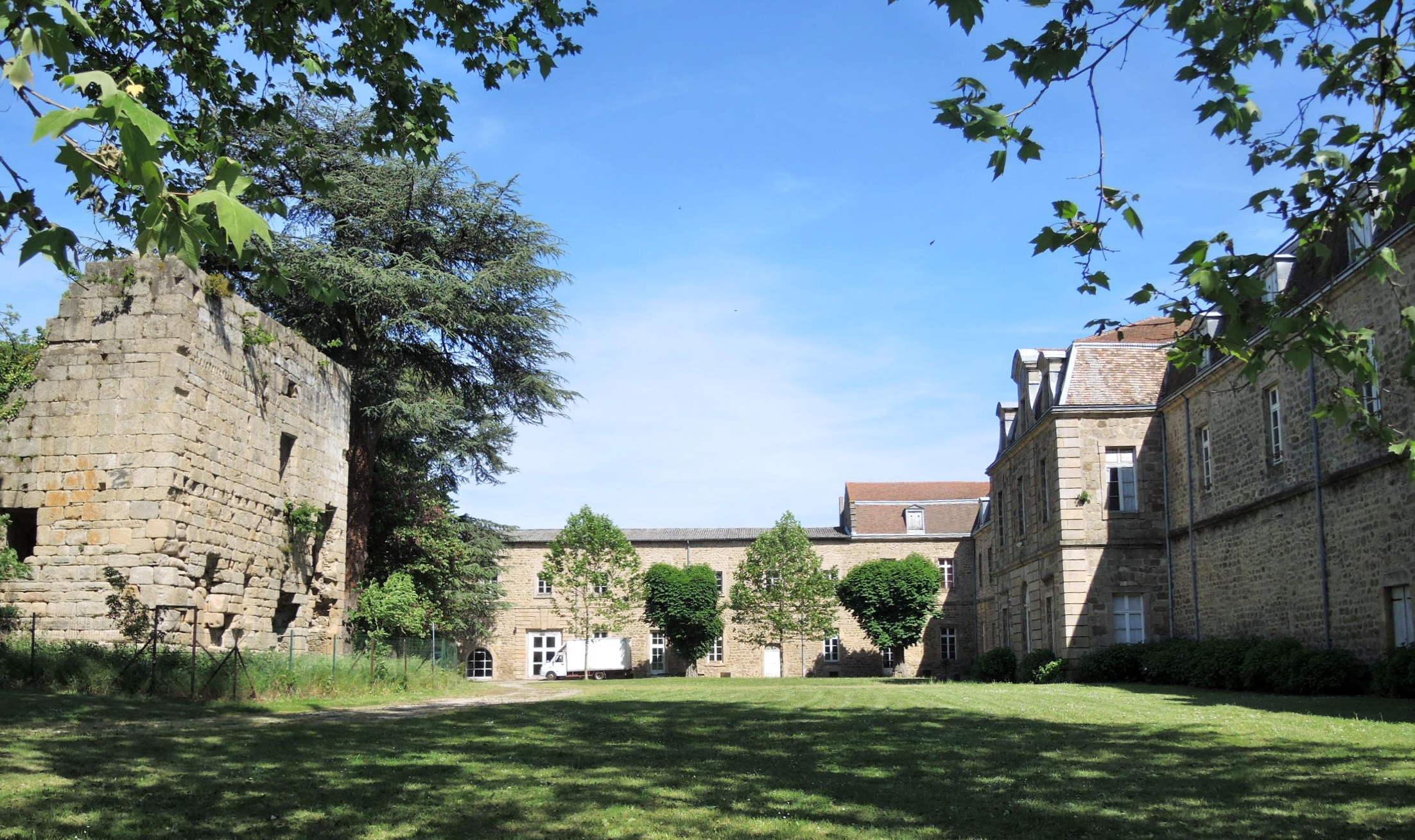 Colombier-le-Cardinal détail